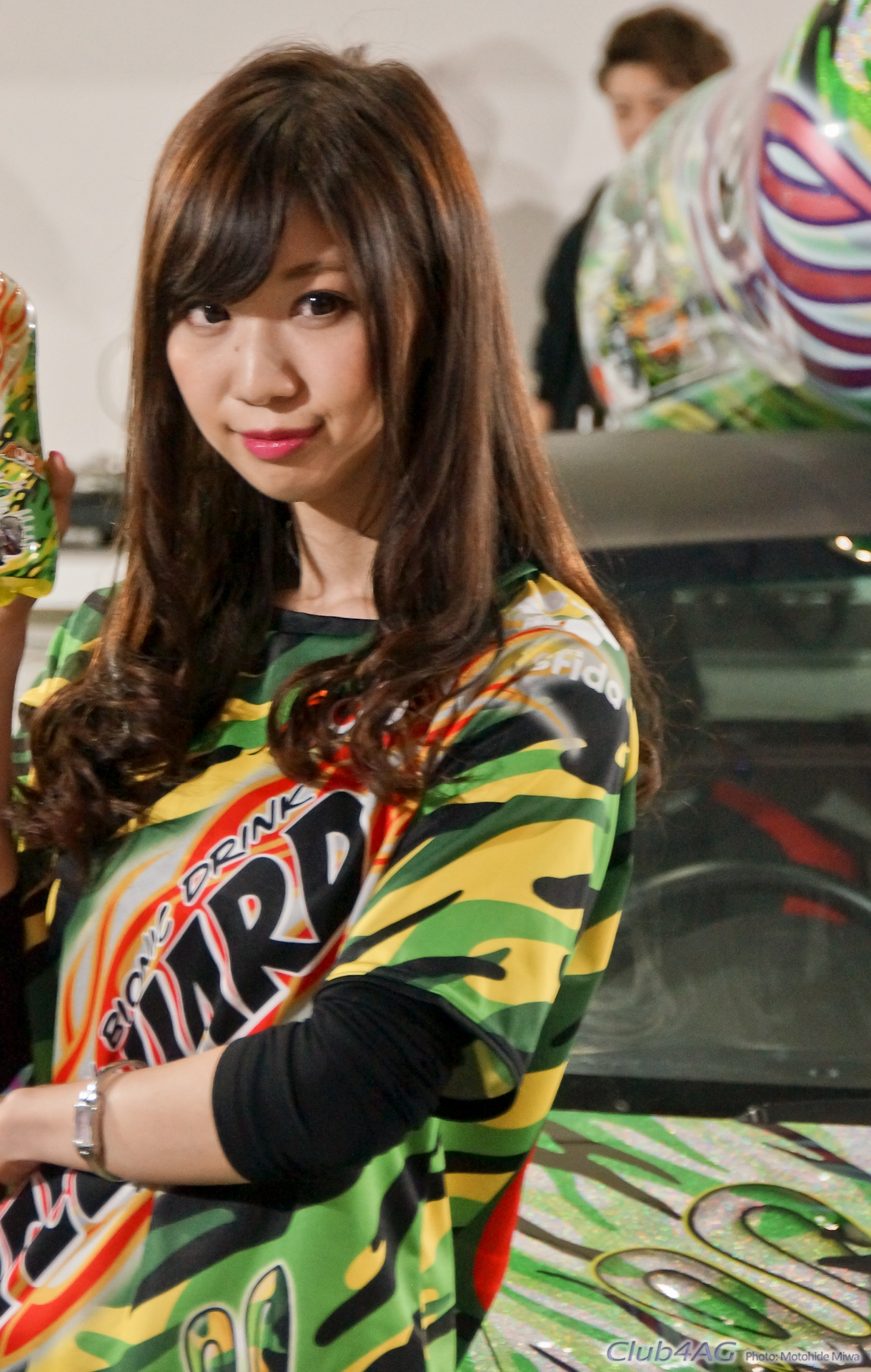 Tokyo Auto Salon 2016